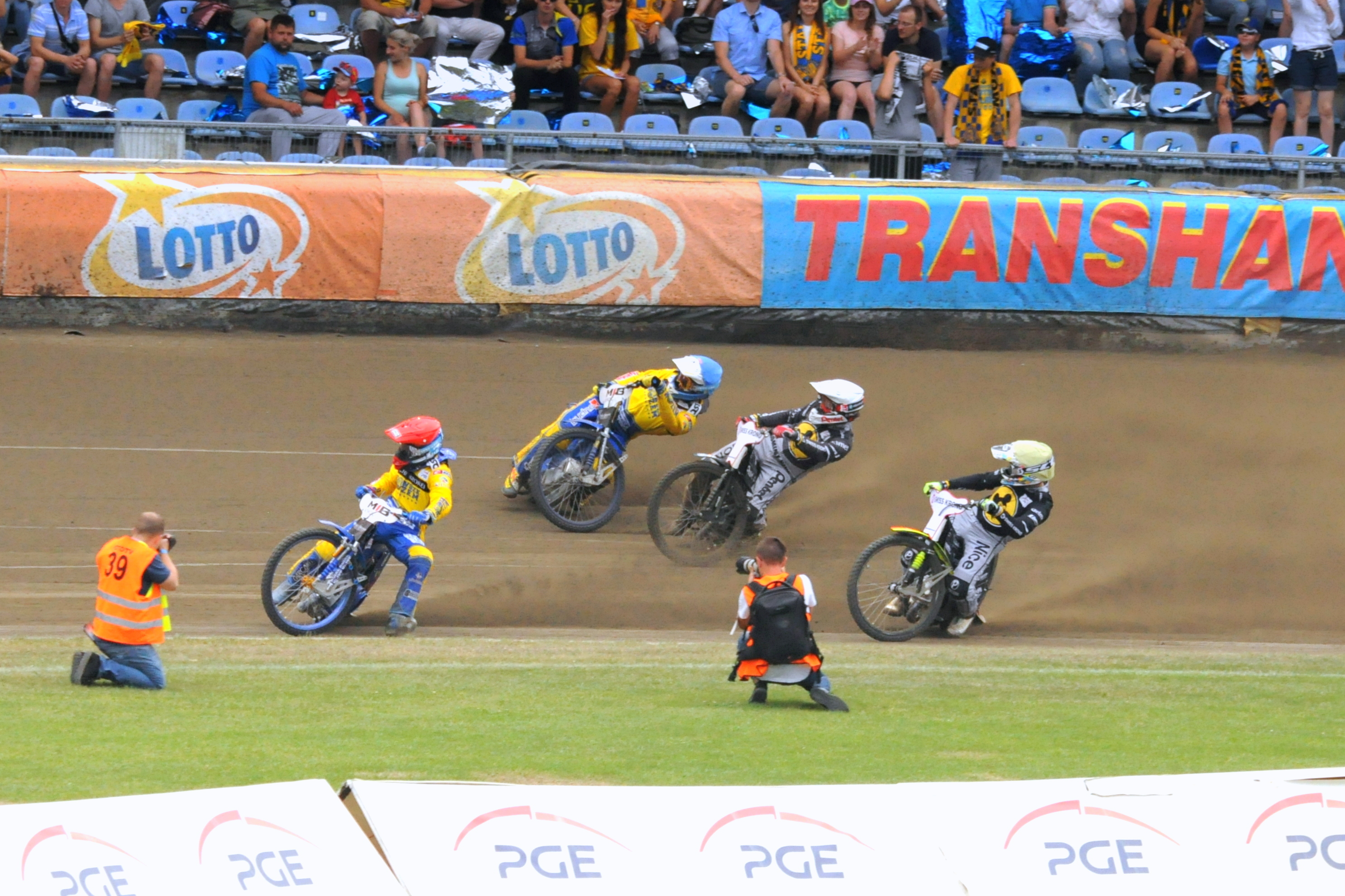 Gorzów Wlkp., 10.06.2018 r., derby nr 96. Bieg 6 od lewej: Bartosz Zmarzlik (3 pkt), Hubert Czerniawski (0 pkt), Piotr Protasiewicz (1 pkt) i Michael J. Jensen (2 pkt)